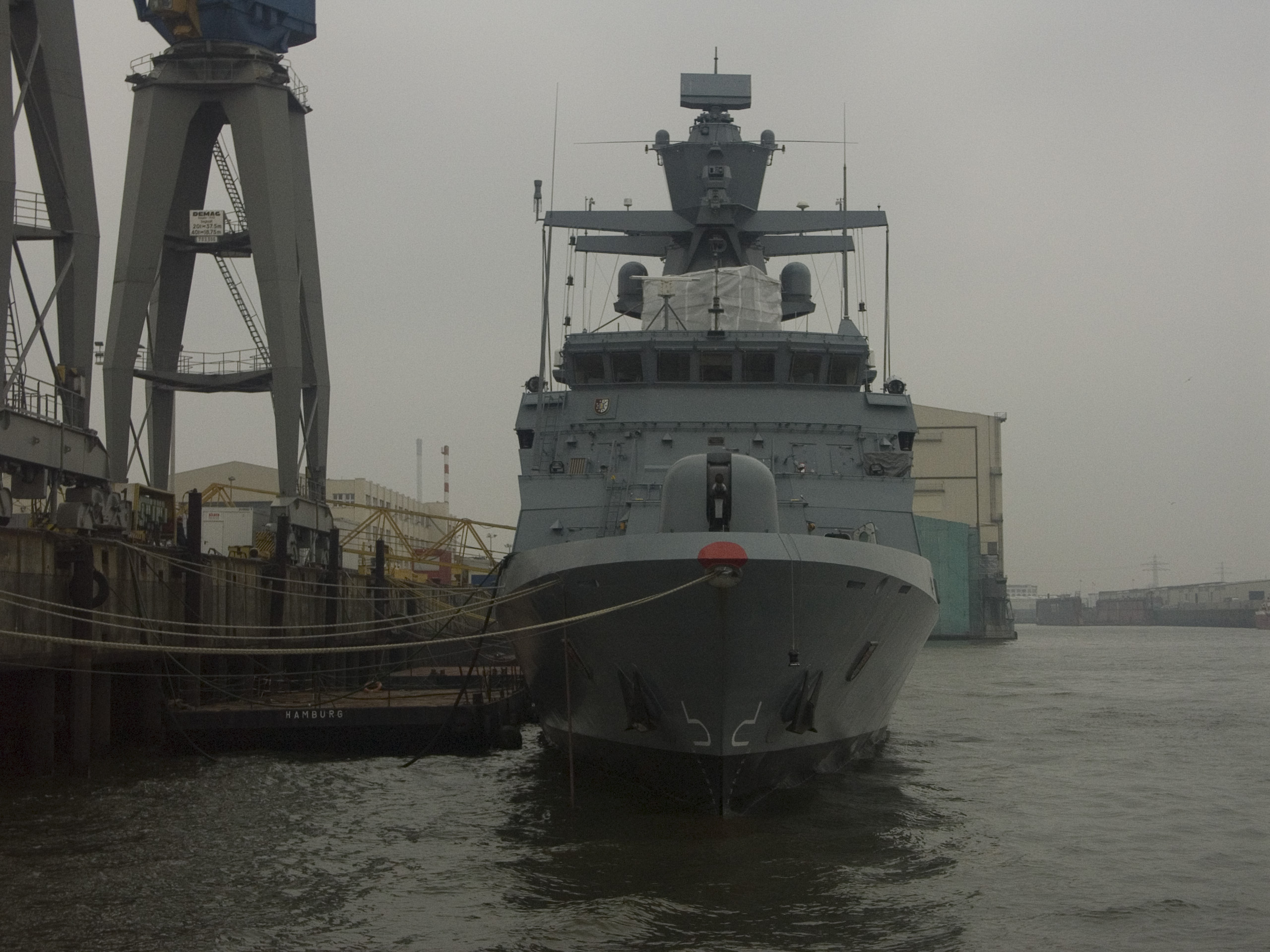 Korvette Braunschweig (F 260) im Hamburger Hafen